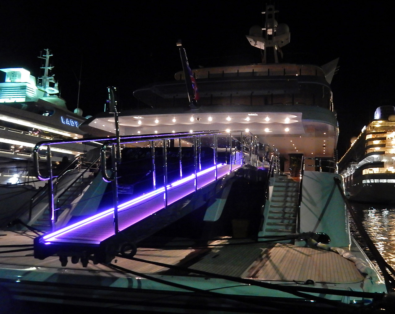 Die Gangway zur Mega-Yacht "Royal Romance". Die Holzverkleidung des Achterdecks verdeckt den eingelassenen Swimmingpool.